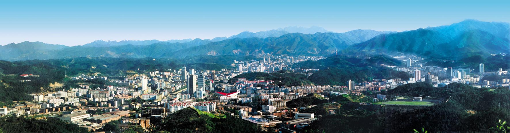 十堰全景图